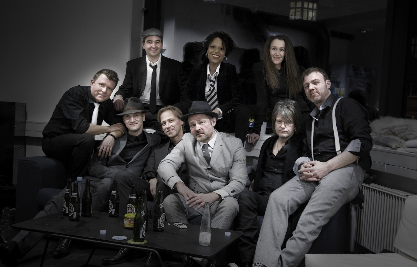 Mek Pek Party Band fejrede sit 30 års jubilæum på Voxhall 2011.